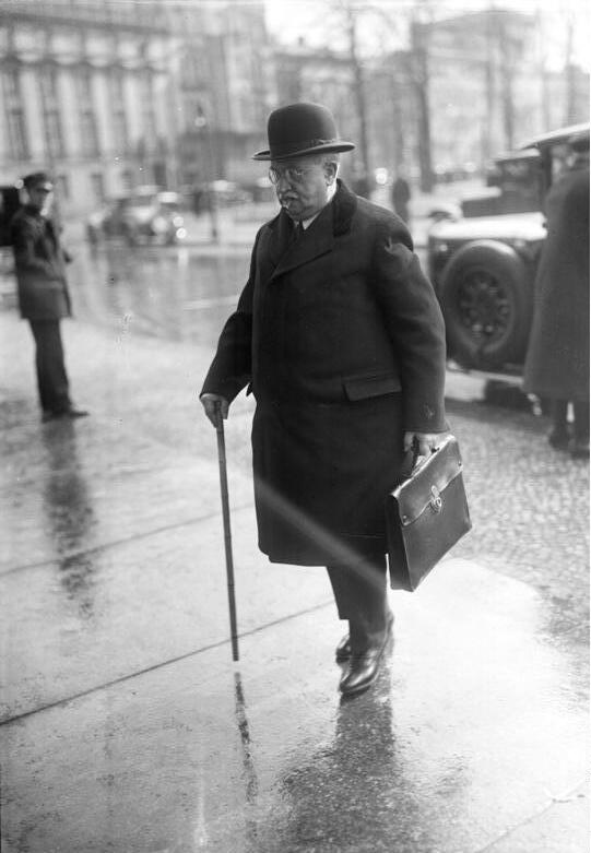 Der Kampf um die Young-Gesetze im Reichstag in Berlin! Die bedeutungsvolle Sitzung, an welcher die Abgeordneten aller Parteien teilnahmen. Reichswirtschaftsminister Dr. Schmidt begibt sich zur Lesung der Young-Gesetze in den Reichstag.